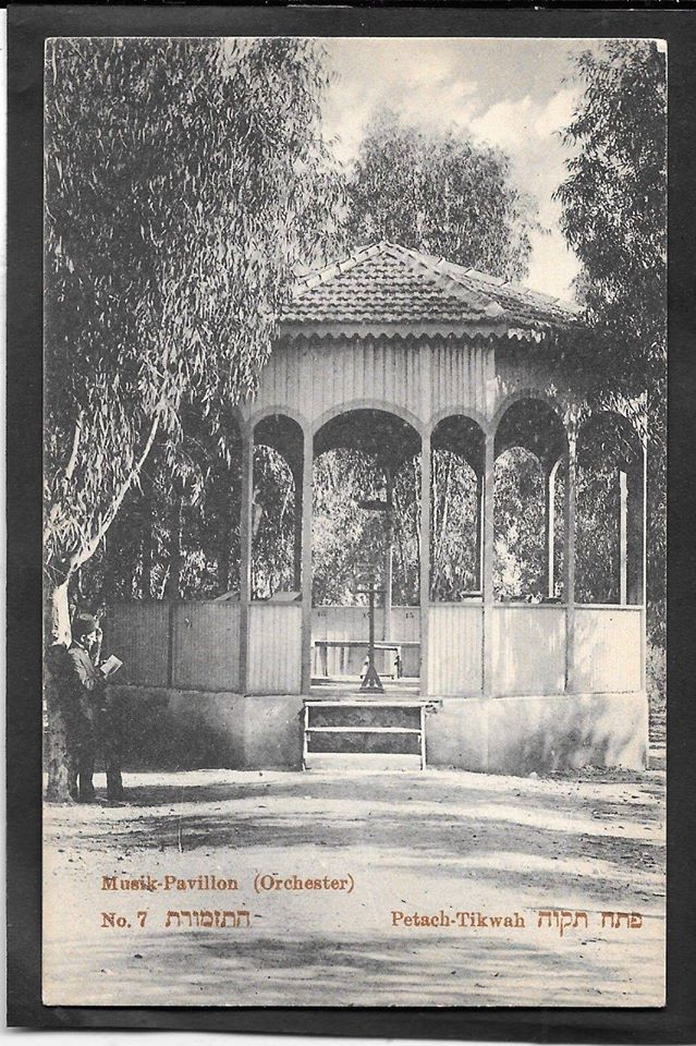 הפביליון - סוכת התזמורת בכיכר המייסדים של פתח-תקווה